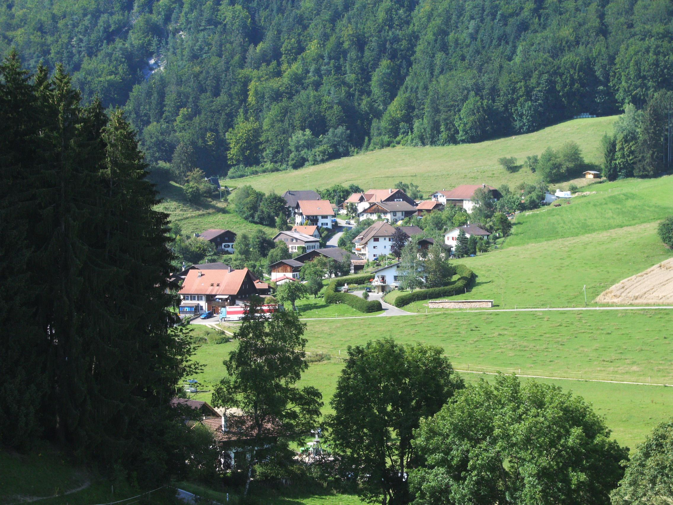 Prise de vue de la commune de Saules (canton de Berne, Suisse). Prise de la photo : depuis Reconvilier en direction du nord. Coordonnées suisses : 583.550/231.200